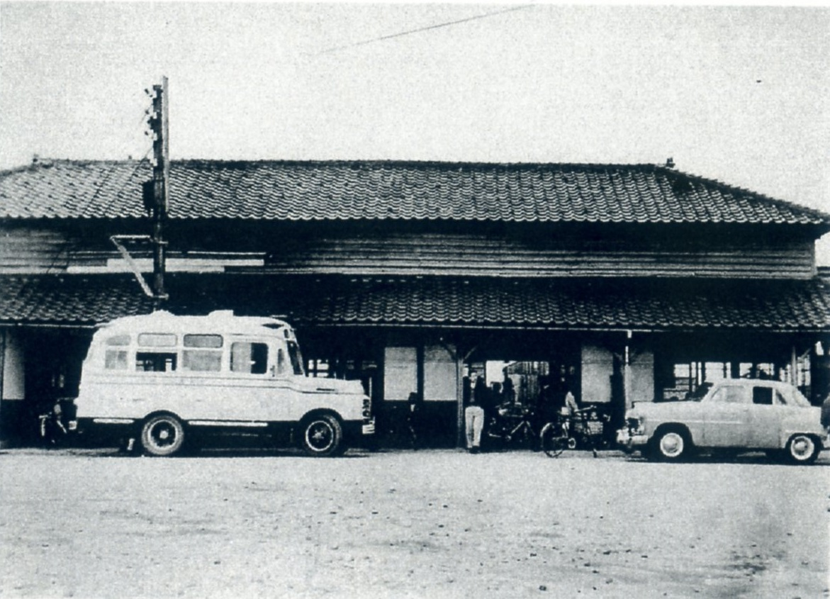 昭和20年代初頭の氷見駅駅舎